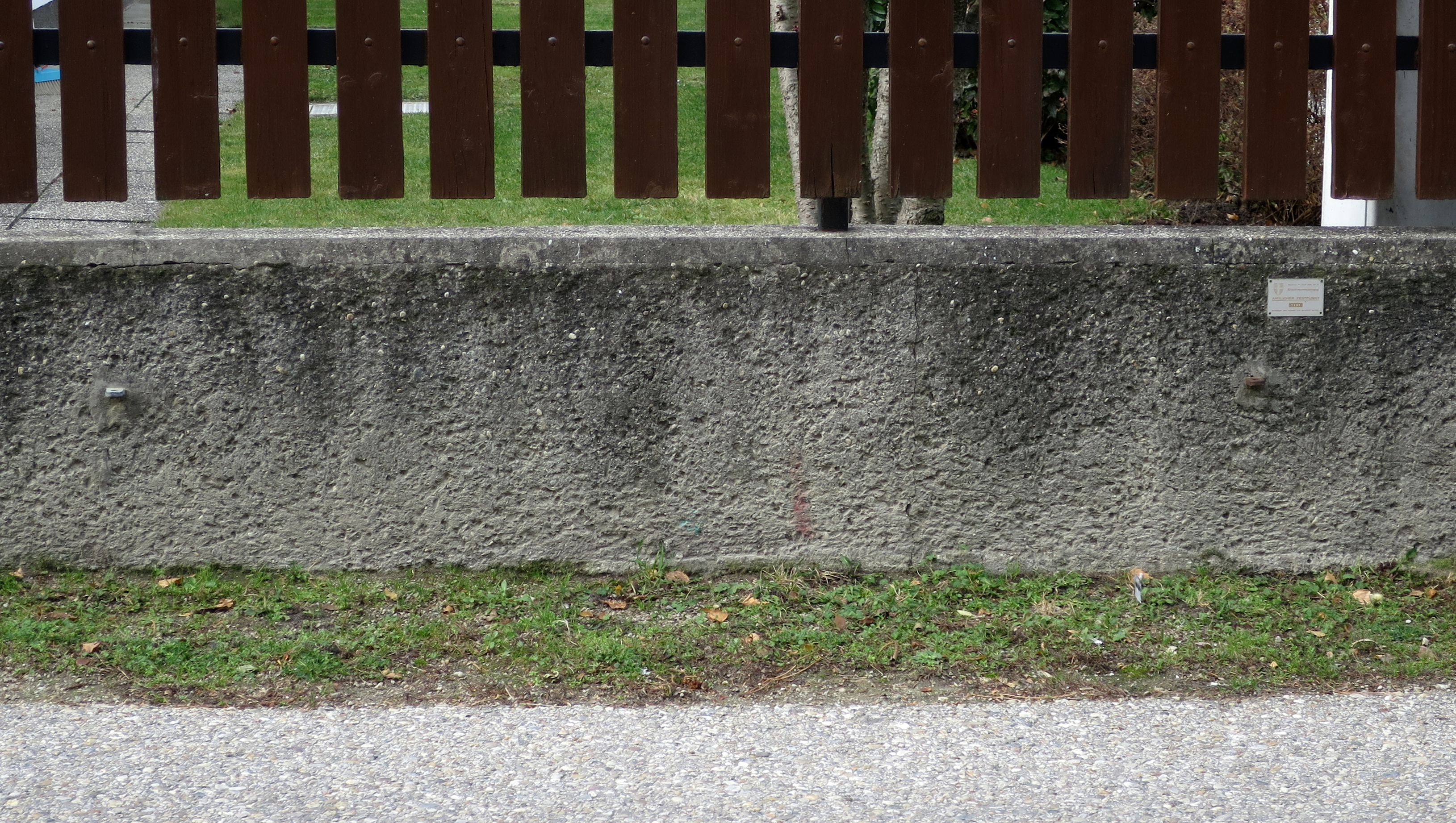 Gabelpunkt als Amtlicher Festpunkt 1191. Wien, Enzianweg.